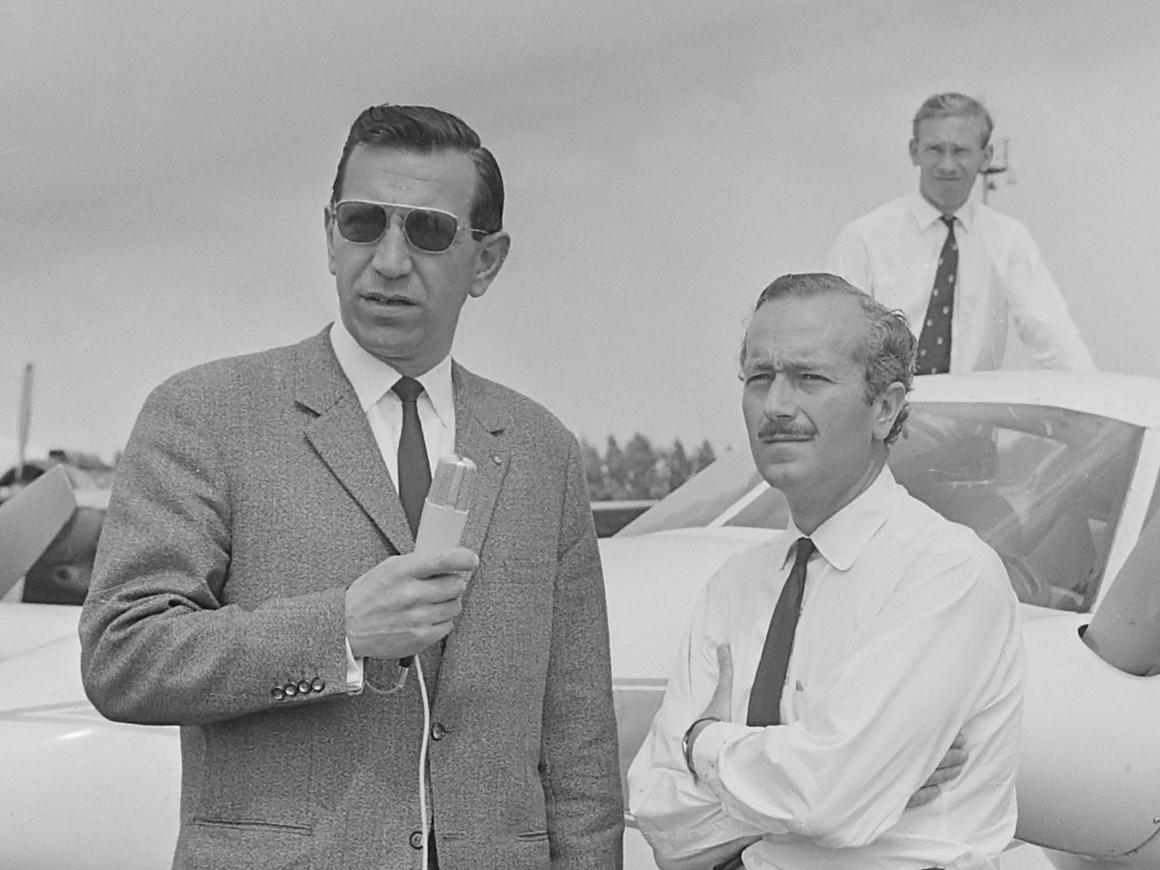 Colin Chapman vertrokken van Schiphol, Colin Chapman (links) en Mike Spence 2e coureur Lotus stappen in vliegtuig 20 juli 1965